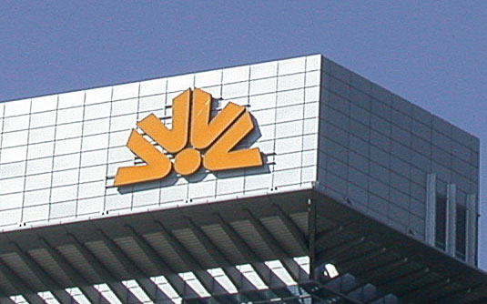 Logo der Commerzbank auf dem Kastor-Hochhaus, Forum Frankfurt an der Frankfurter Messe